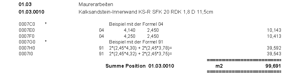 Darstellung der Formel 04 und 91 der REB-VB 23.003 - Allgemeine Bauabrechnung